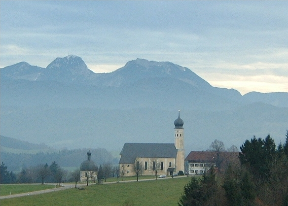 Wallfahrtskirche ST.Marinus zu Wilparting bei Irschenberg ist auch unter den Namen "Kirche der Liebe" bekannt. Die Tochter-Kirche ST.Anius erhielt den Namen "Kirche der Einsamkeit". eigenes Bild